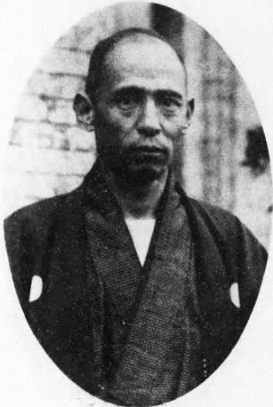 高橋寿太郎